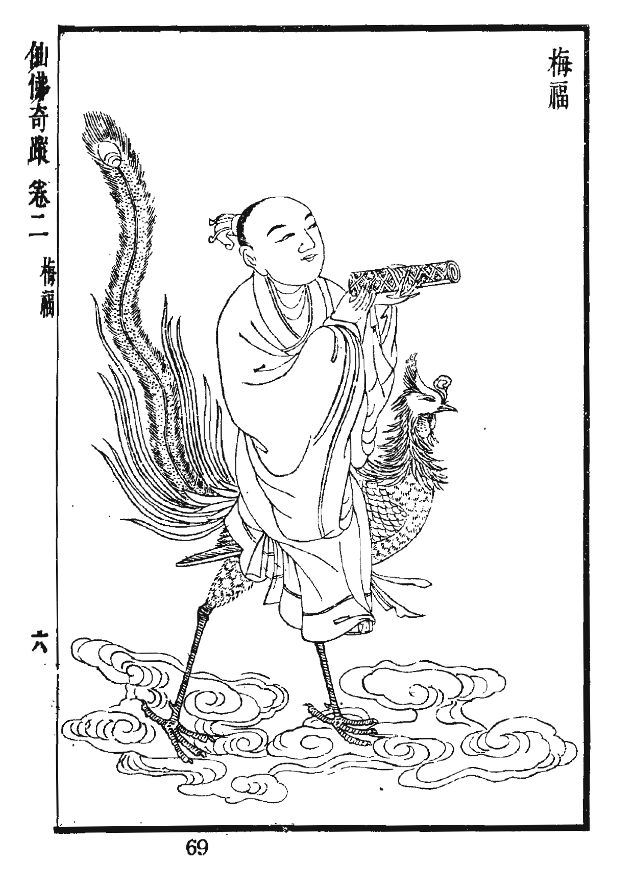 仙佛奇蹤插圖